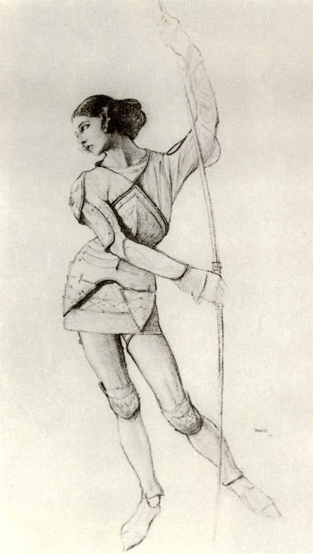 Léon Bakst, Costume for dancer Ida Rubinstein (1885-1960) in the leading male role in Gabriele D'Annunzio's Le marthyre de Saint Sébastien, 1912. Бакст Лев Самуилович. Рисунок для эскиза костюма святого Себастьяна к мистерии Гобриеле д-Аннунцио *Мученичество святого Себастьяна. 1911